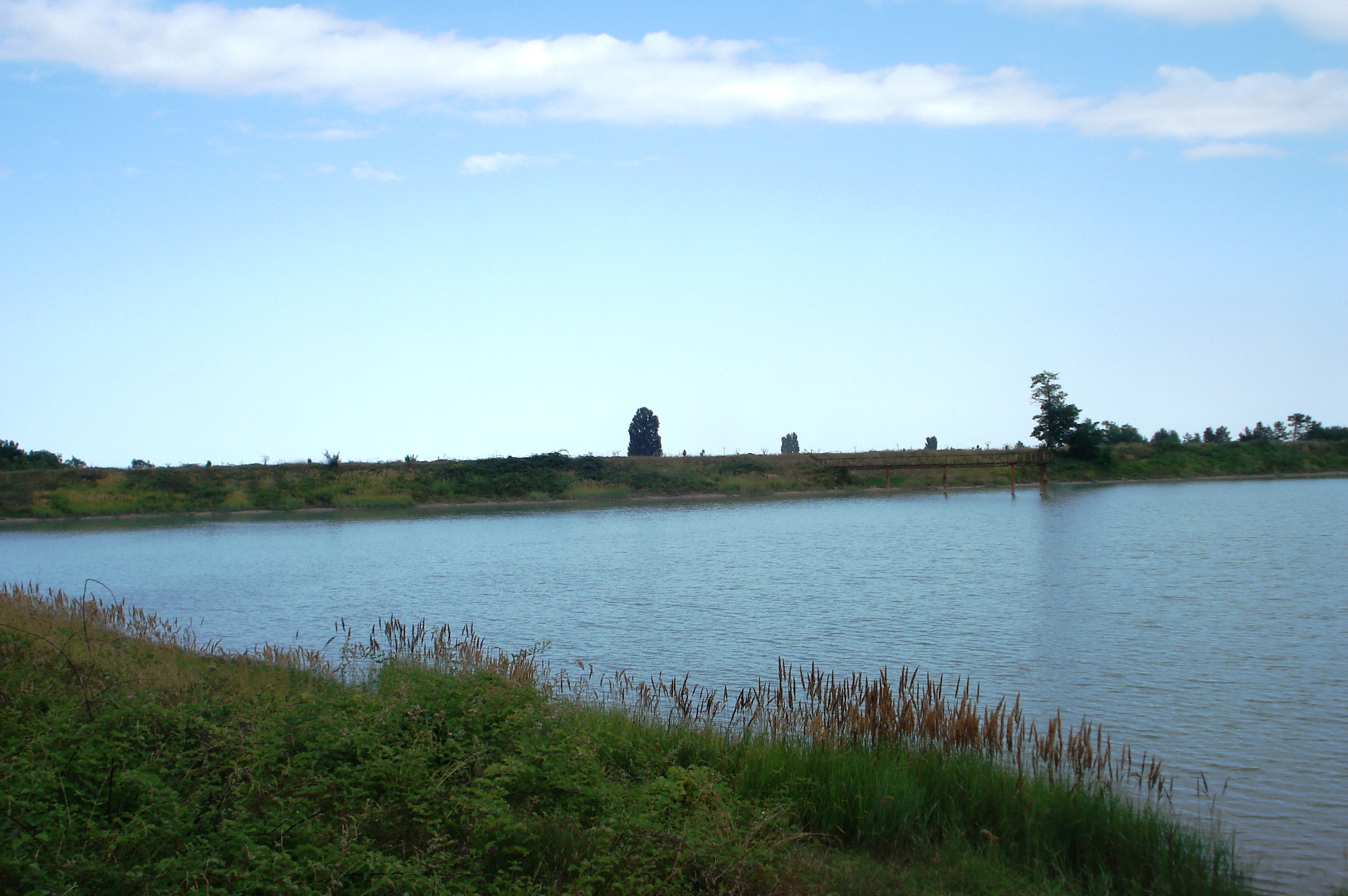 Озеро Фиалка в Кусарах